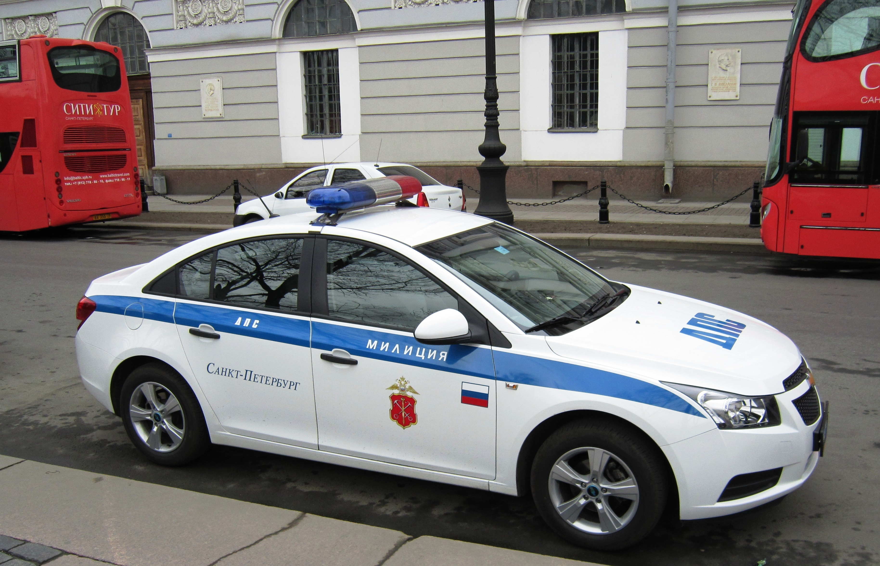 Russische politie auto